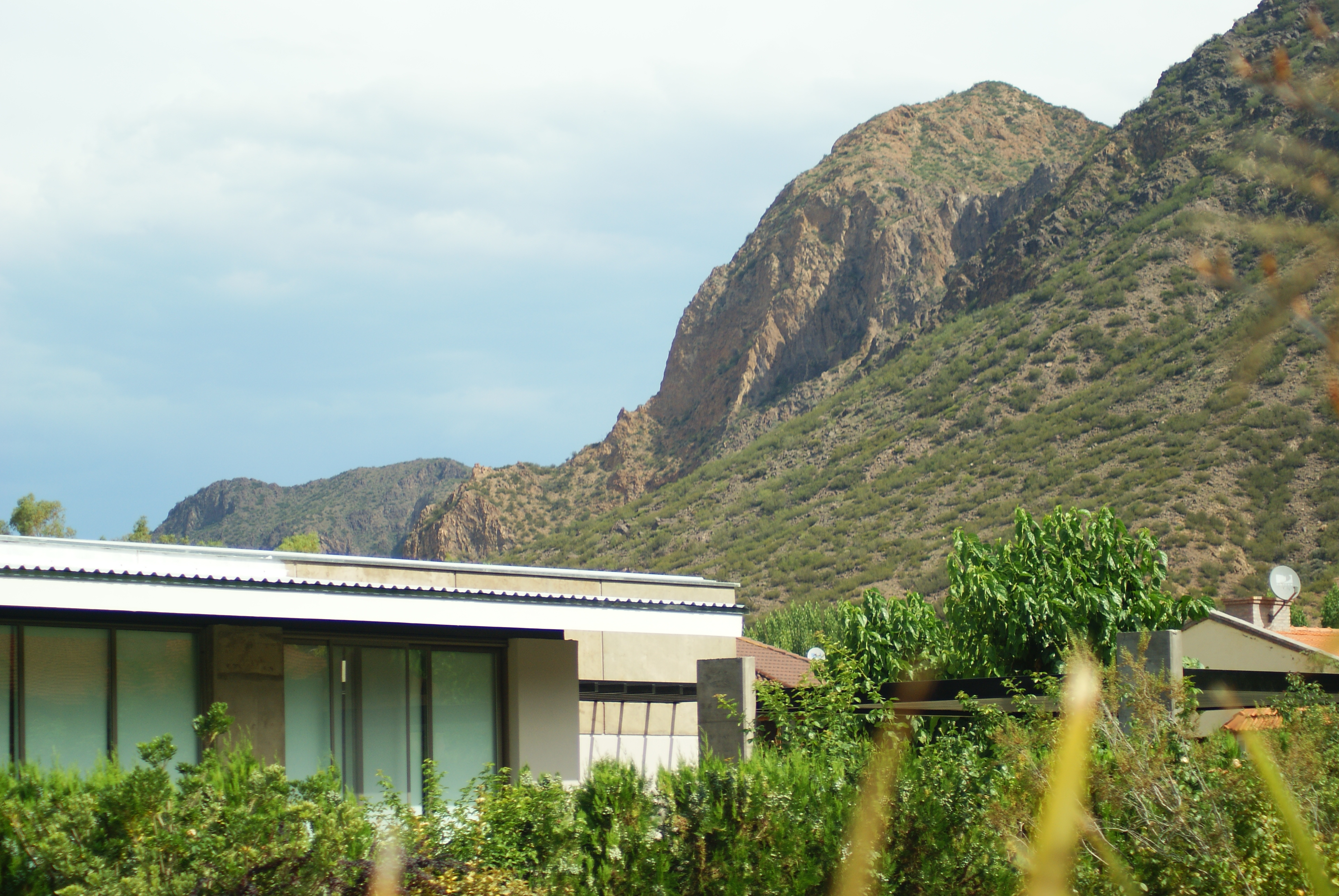 Pequeña vista de las montañas en Valle Grande, hermoso sitio turistico de San Rafael.